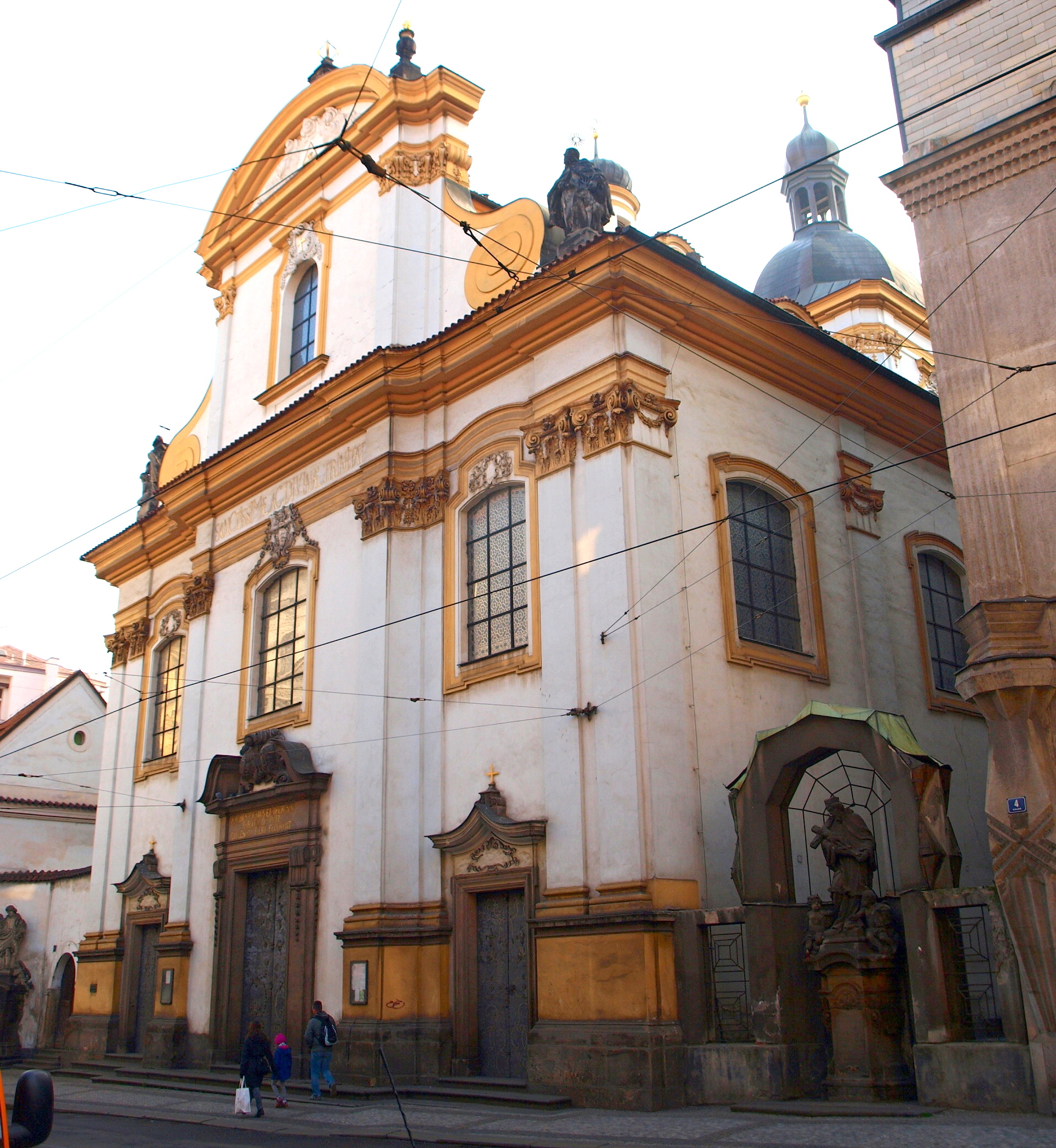 Kostel Nejsvětější Trojice, Praha, ul. Spálená